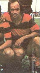 Oscar "Pinino" Mas (n. Villa Ballester, Prov. de Bs. As., 1946), futbolista argentino.